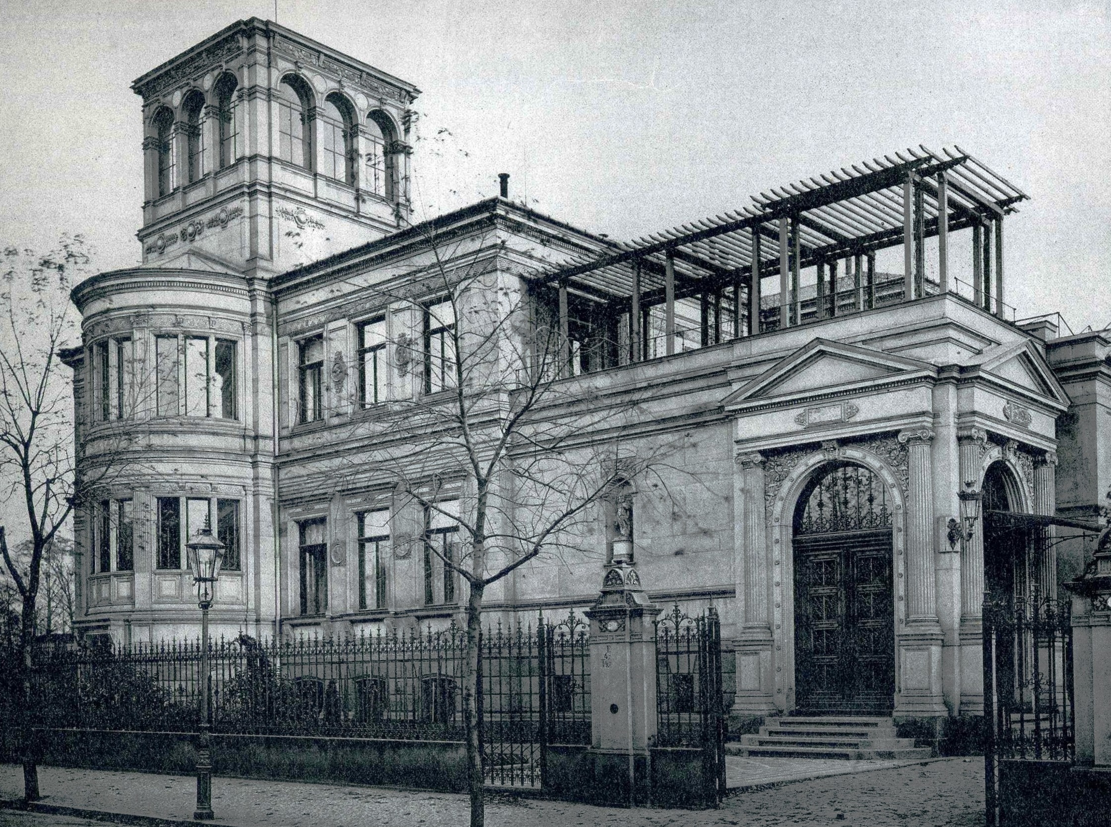 Dresden, Villa Beuststraße 1, Außenfassade